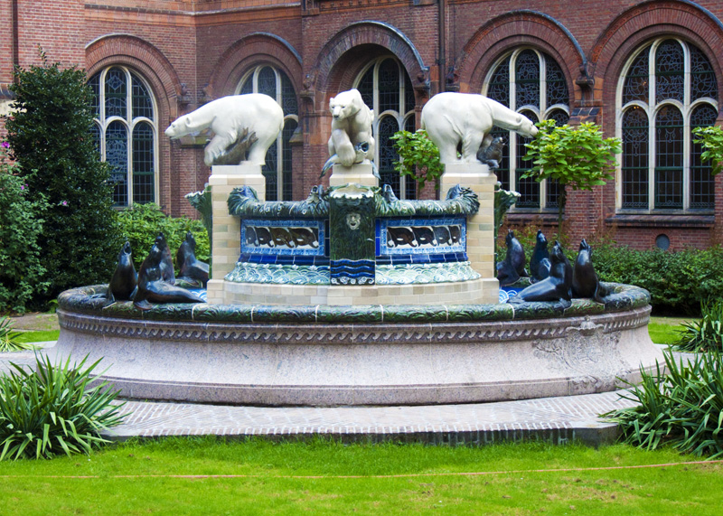 Fontaine au centre du Palais de la Paix représentant quatre ours polaire pêchant les saumons et entourés de phoques.